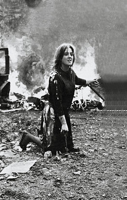 Marta Minujín durante su happening La destrucción de 1965